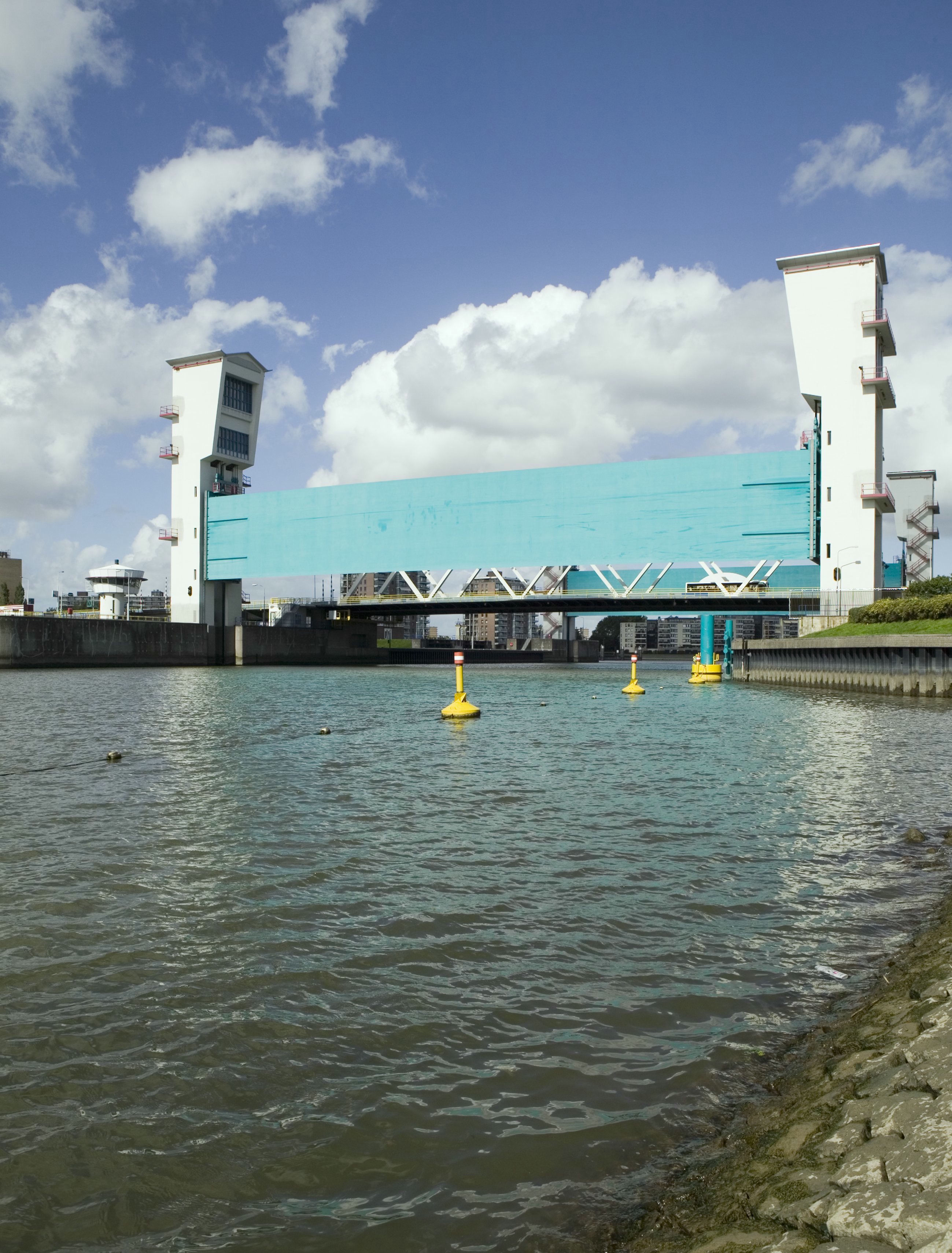 Stormvloedkering - Algerabrug: Overzicht Algerabrug, gezien vanaf de IJsseldijk (opmerking: Gefotografeerd voor Monumenten van Herrezen Nederland)